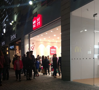 Tienda de la cadena Miniso en un centro comercial al sur de la Ciudad de México, zona de Coapa, en la alcaldía de Tlalpan.